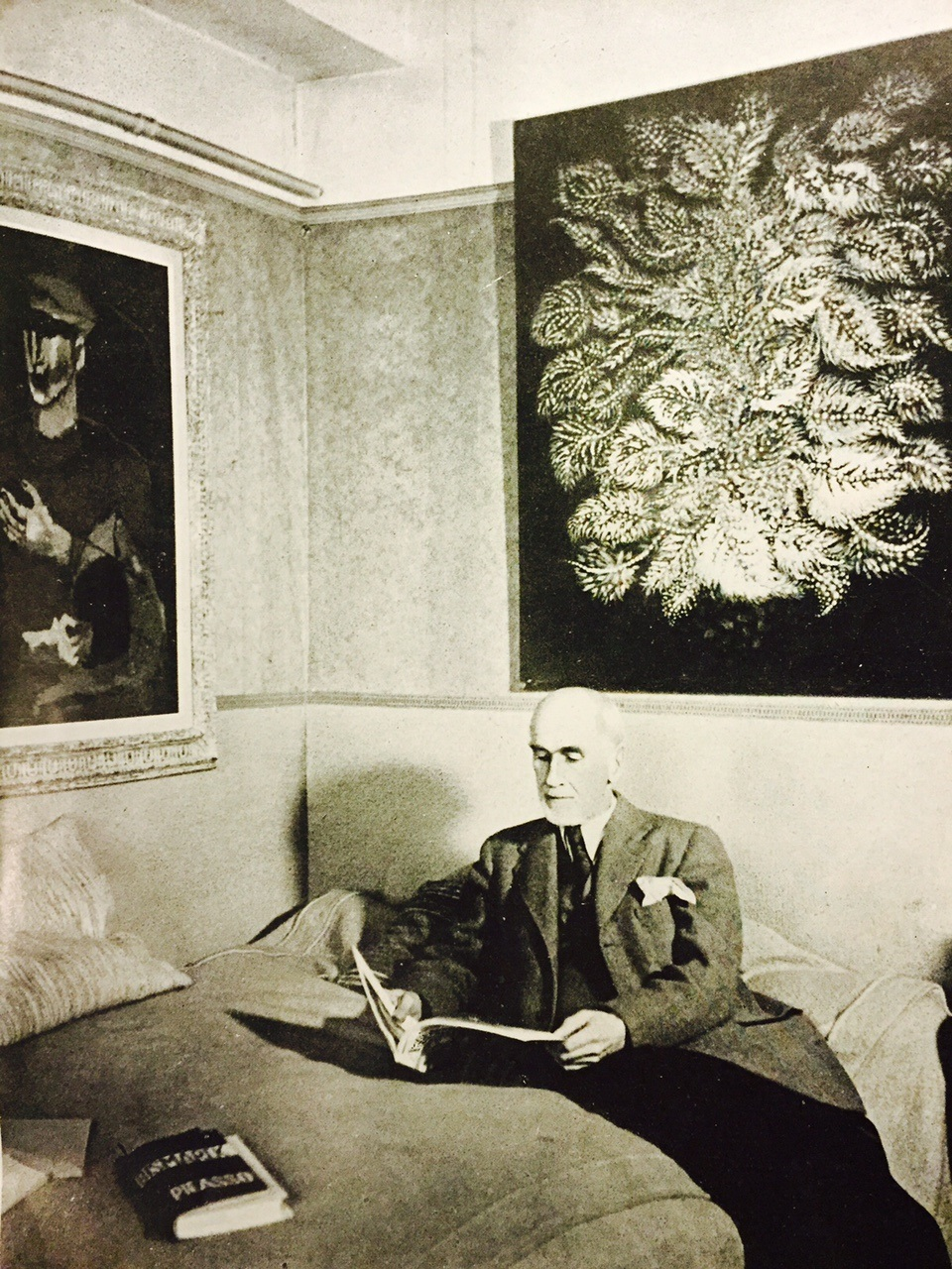 Wilhelm Uhde, Style de France, 15-04-1947